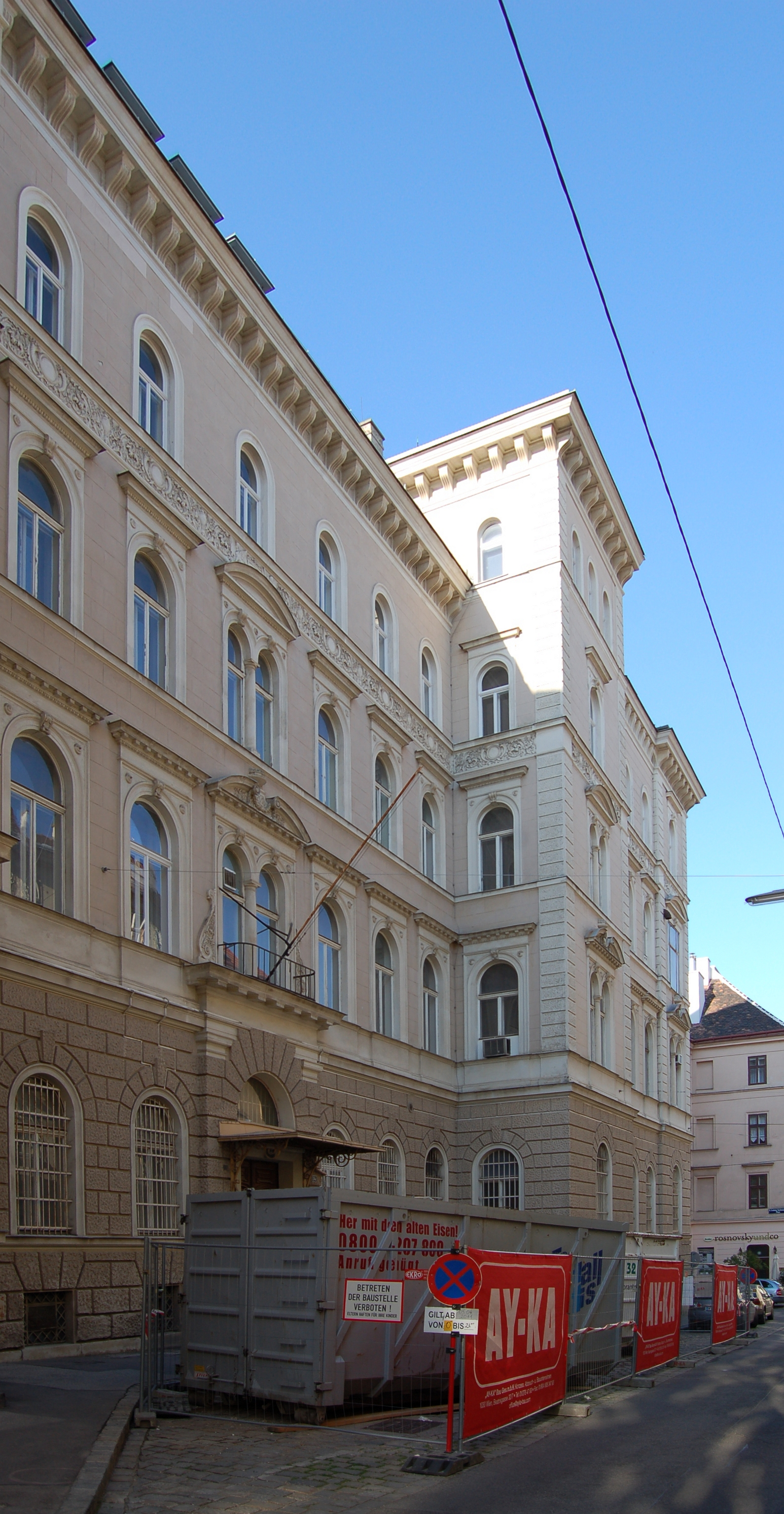 Das denkmalgeschützte Gebäude in der Schmidgasse 12-14 in Wien-Josefstadt.